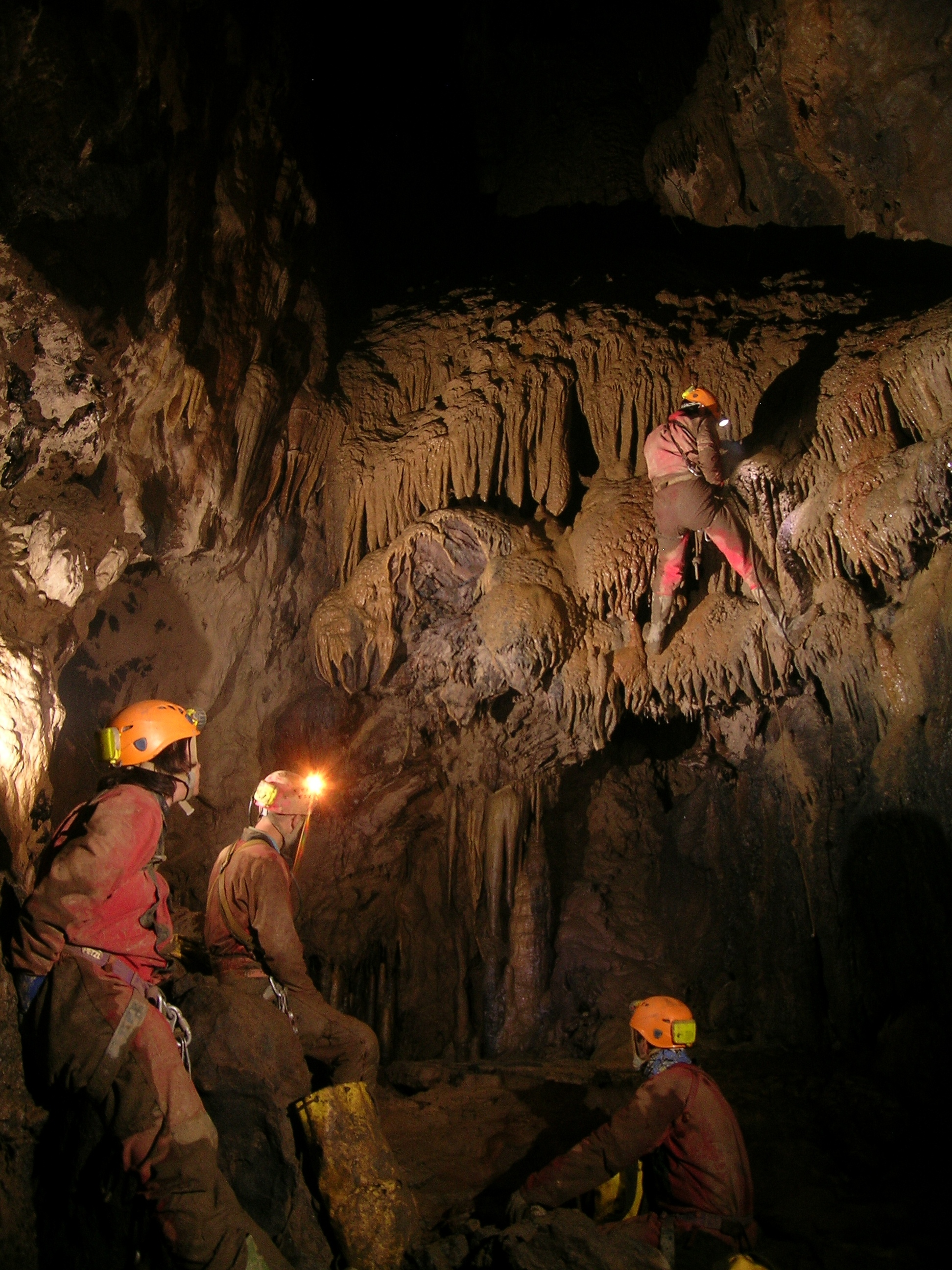 ADES Espeleologia Elkarteko kideak Iñubija I kobazuloan (Ispaster), galeria fosil baten horma eskalatzen.